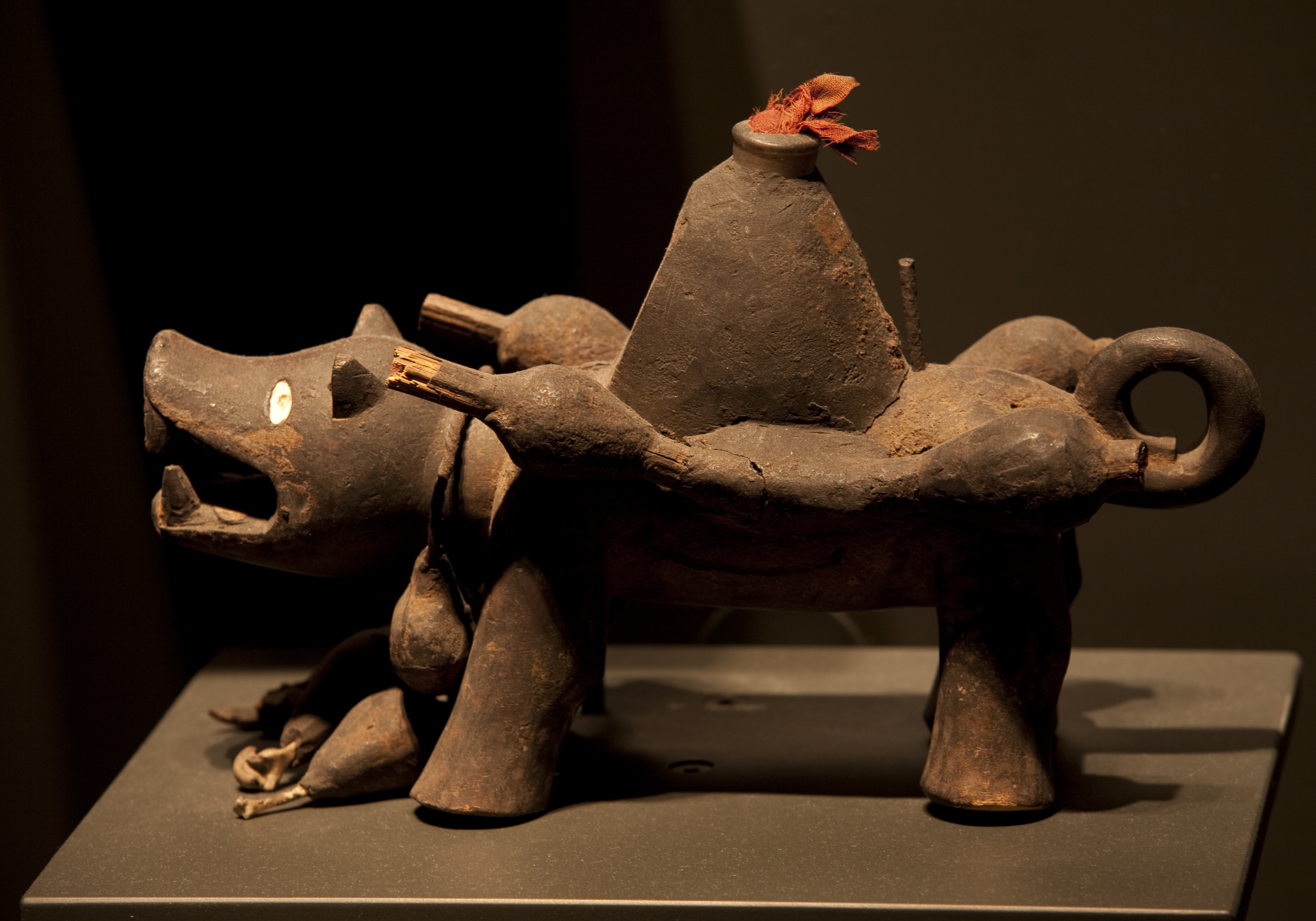 Hond, Nkisi kozo, voor 1885 (2668-2121) An Nkisi (plural Minkisi, also Nkishi/Minkishi), literally translates as "sacred medicine". The term Nkisi is the general name for a variety of objects used throughout the Congo Basin in Central Africa thought to contain spiritual powers or spirits (called "mpungo")[1]. In the sixteenth century, when the Kingdom of Kongo was converted to Christianity, ukisi (an adverbial form of the noun) was used to translate "holy".